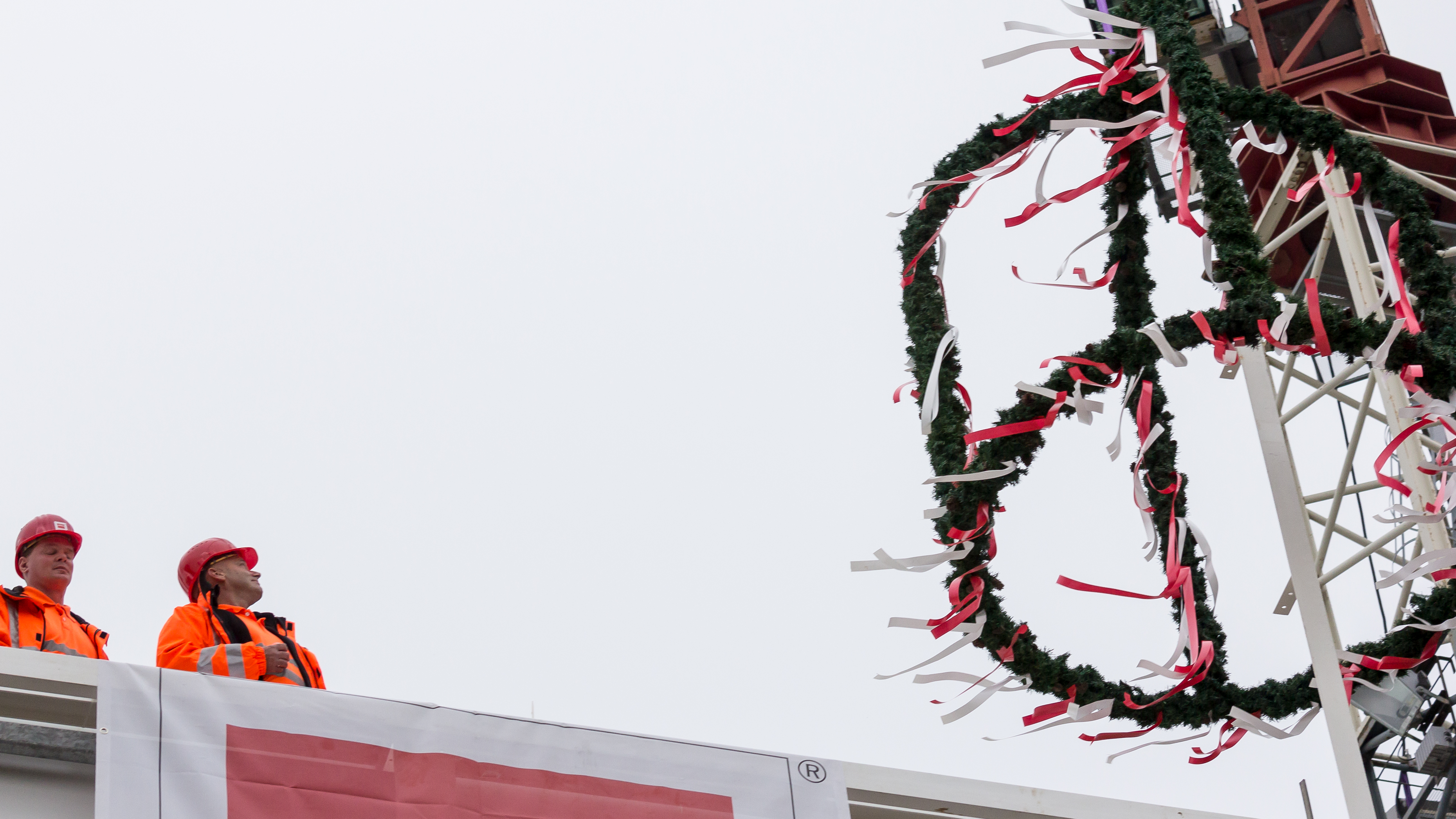 Richtfest ICE-Instandhaltungswerk Köln-Nippes